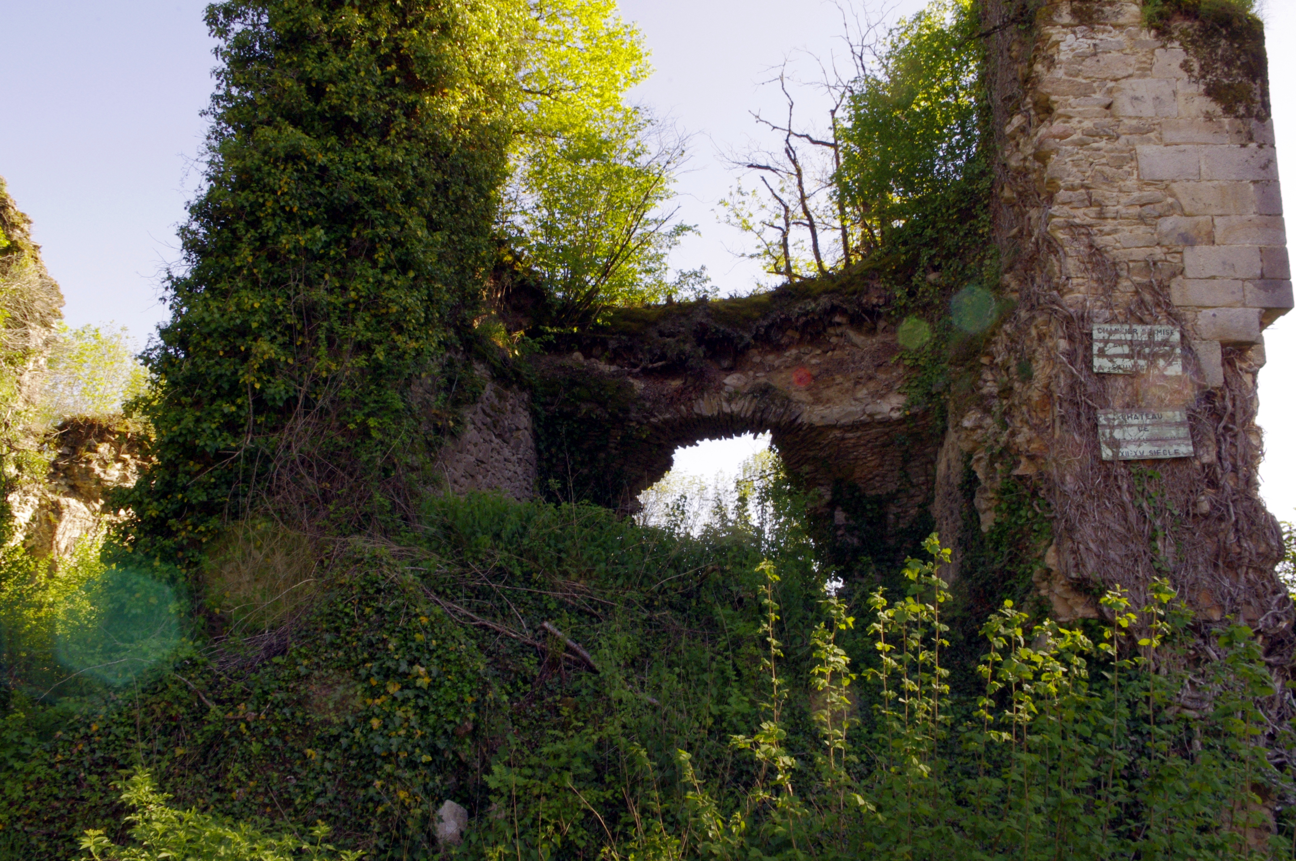 Vestiges du château de Lavauguyon, commune de Maisonnais sur Tardoire